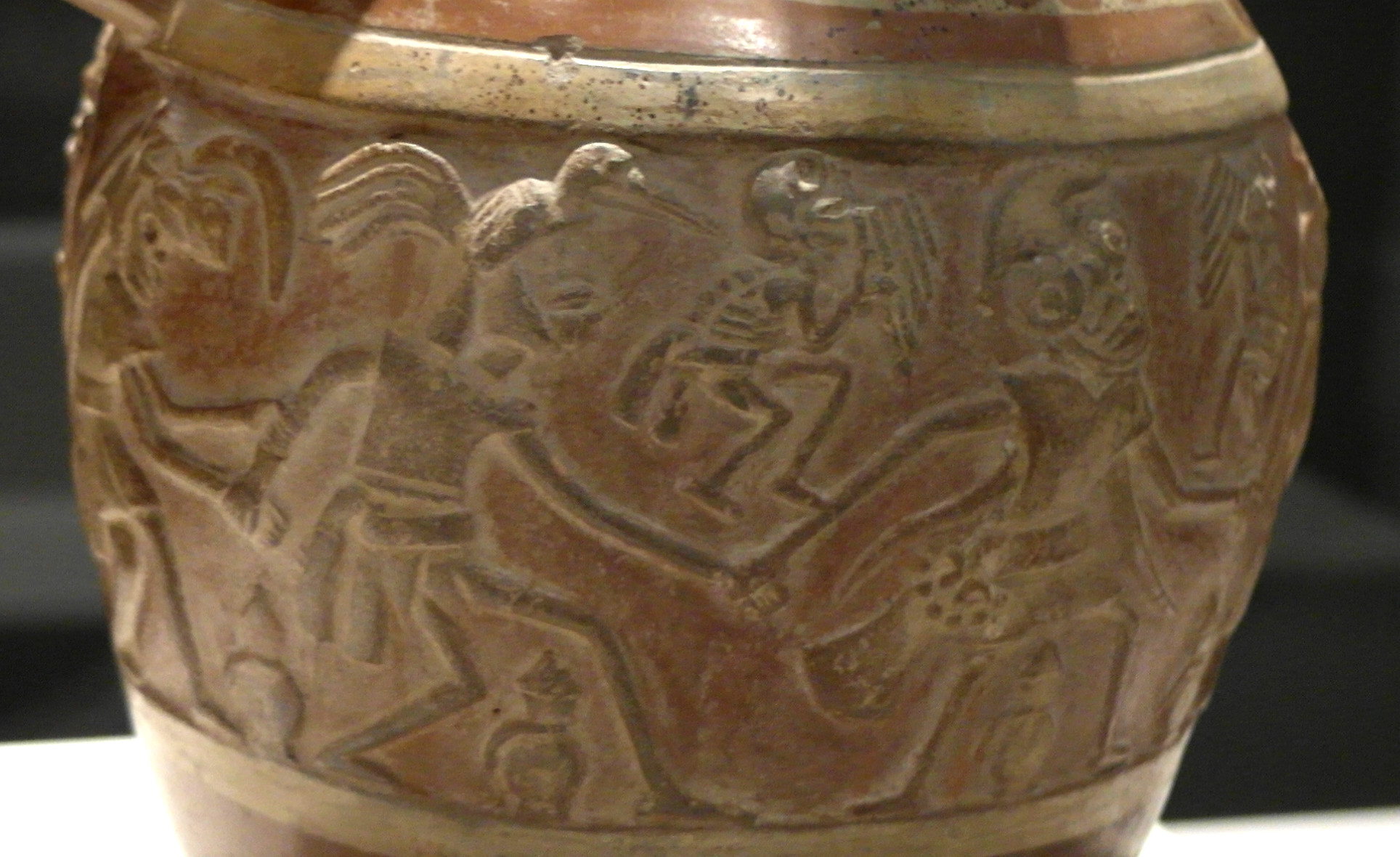 Recipiente ceremonial con danza de muertos, mochica.